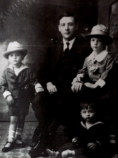 Caracciolo Parra León (1901-1939) y sus tres hijos.